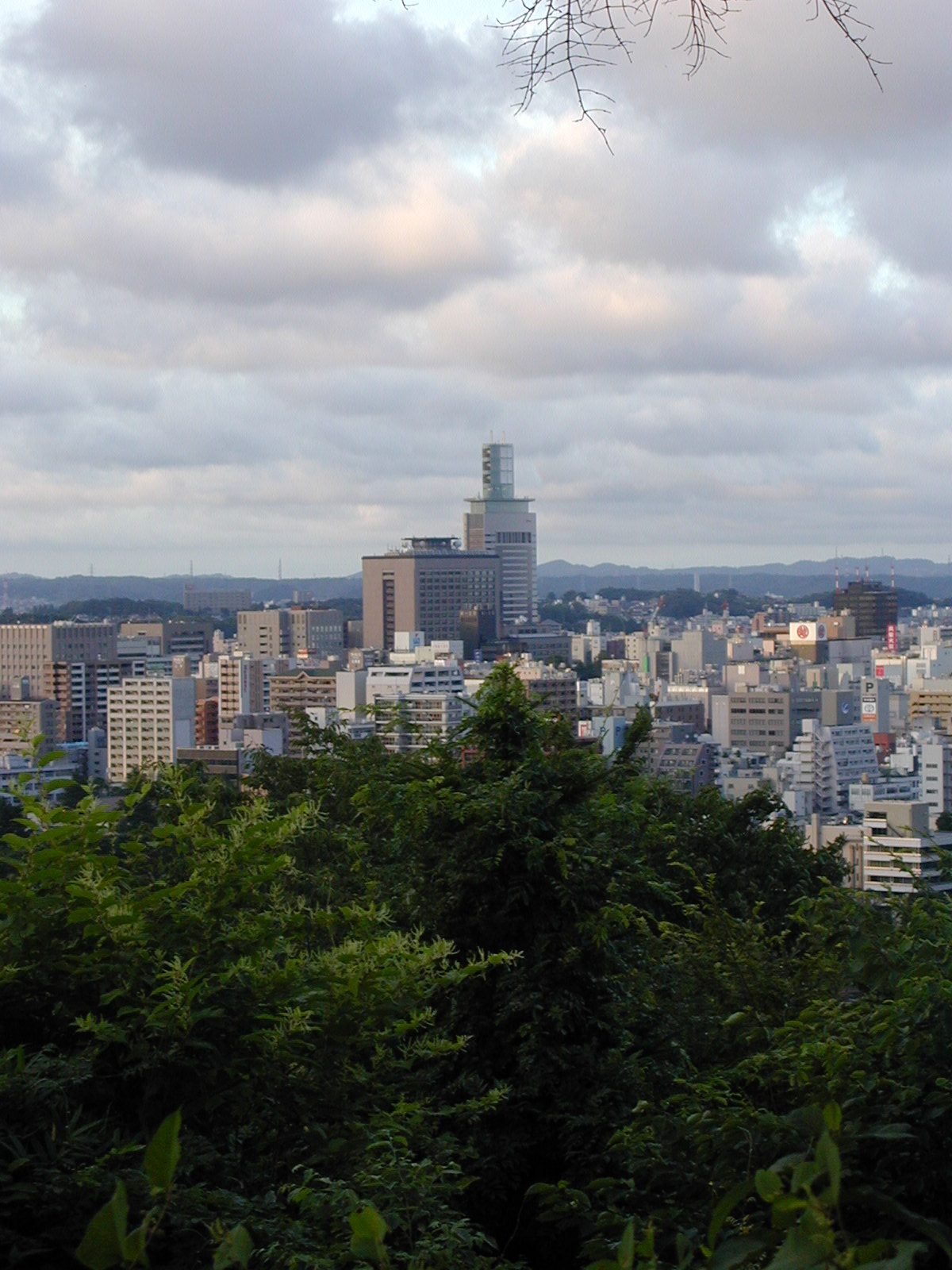 仙台城天守台から撮影した宮城県庁舎とドコモ東北ビル